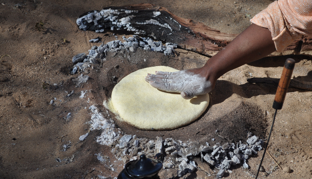 taguella - plat traditonnel touareg